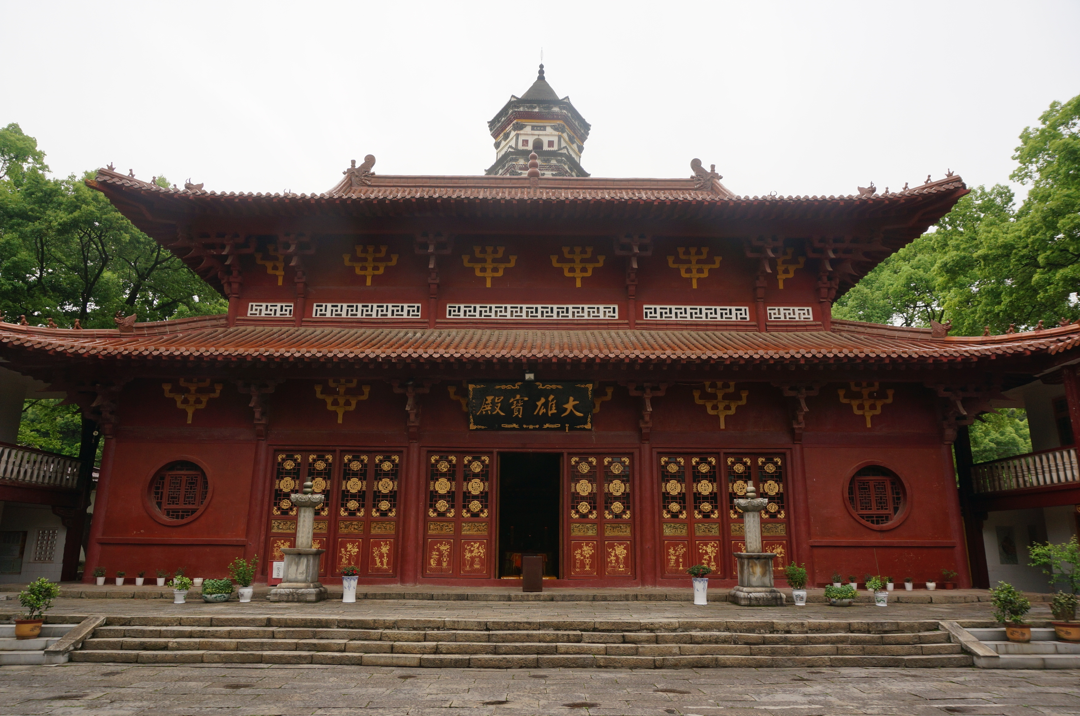 庐山西林寺，大雄宝殿，南面。